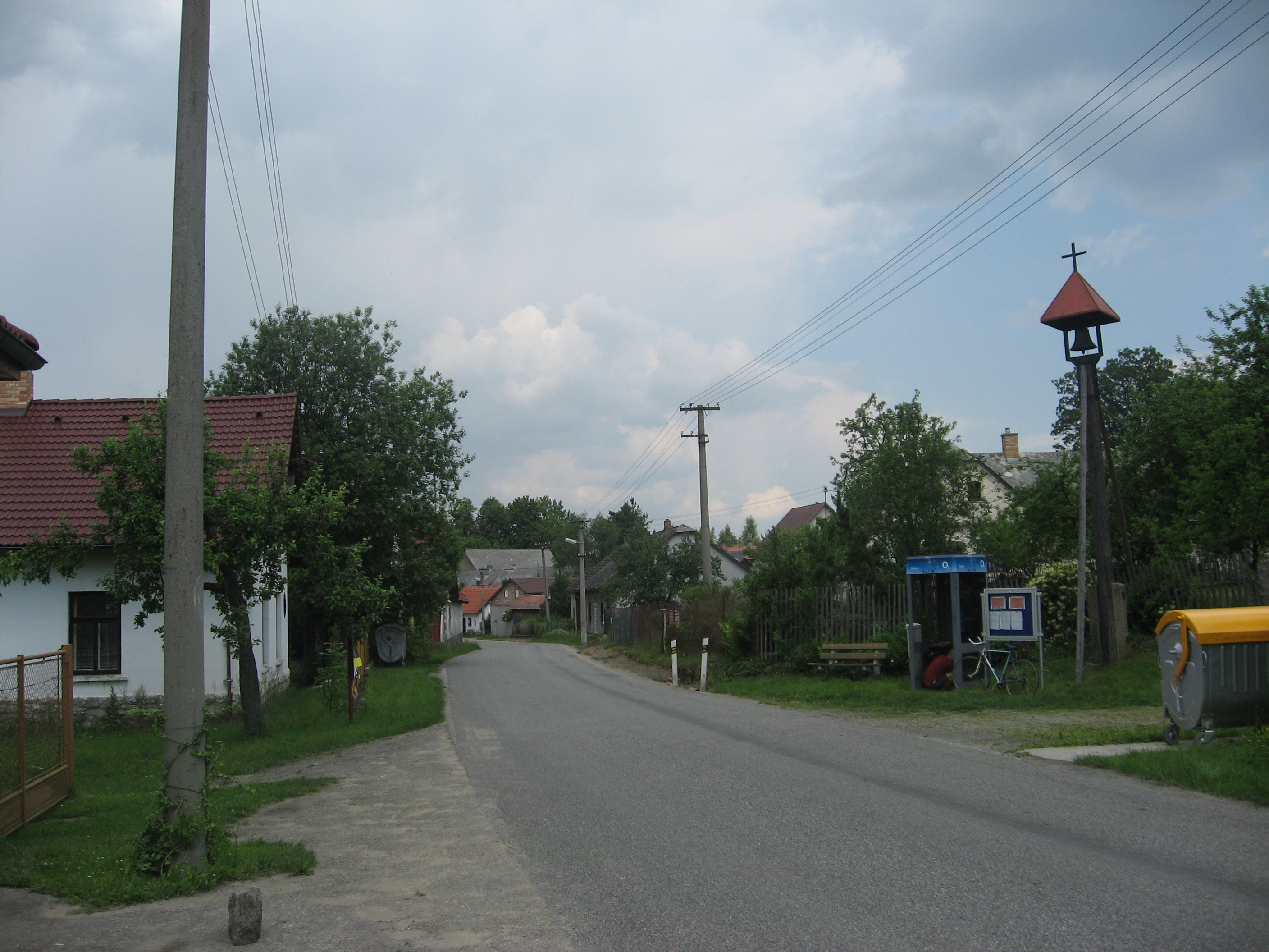 Slavníč